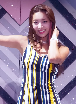 170708 SMTOWN LIVE - 루나 'Free Somebody' 4K 직캠 by DaftTaengk 2m 30s